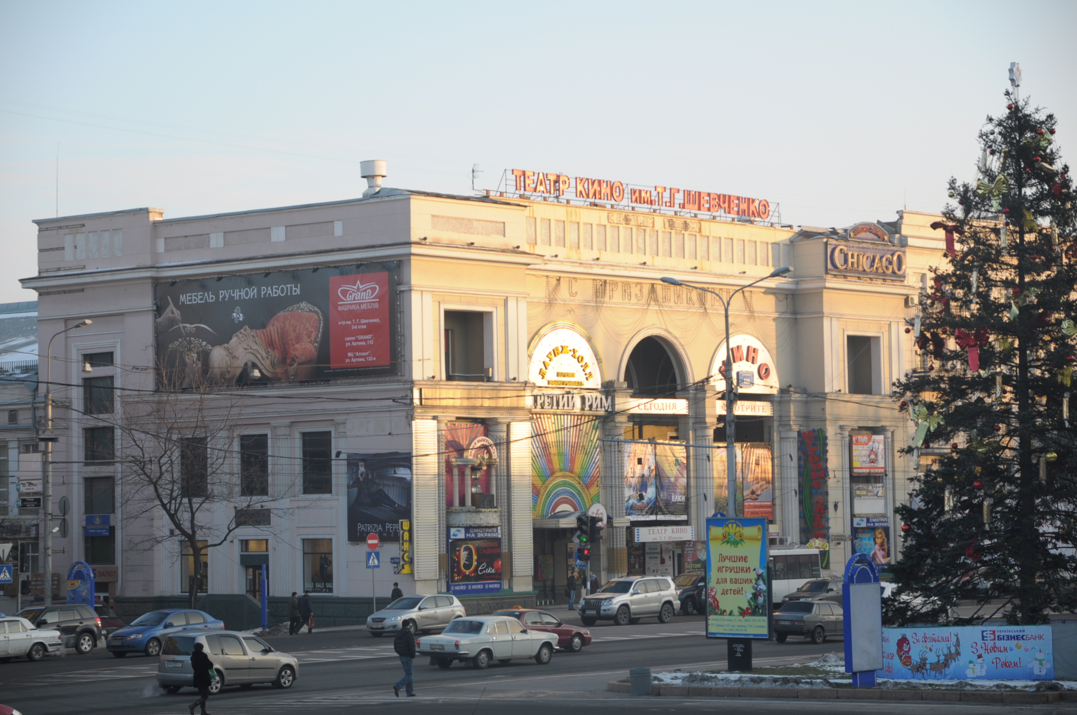 Театральная площадь